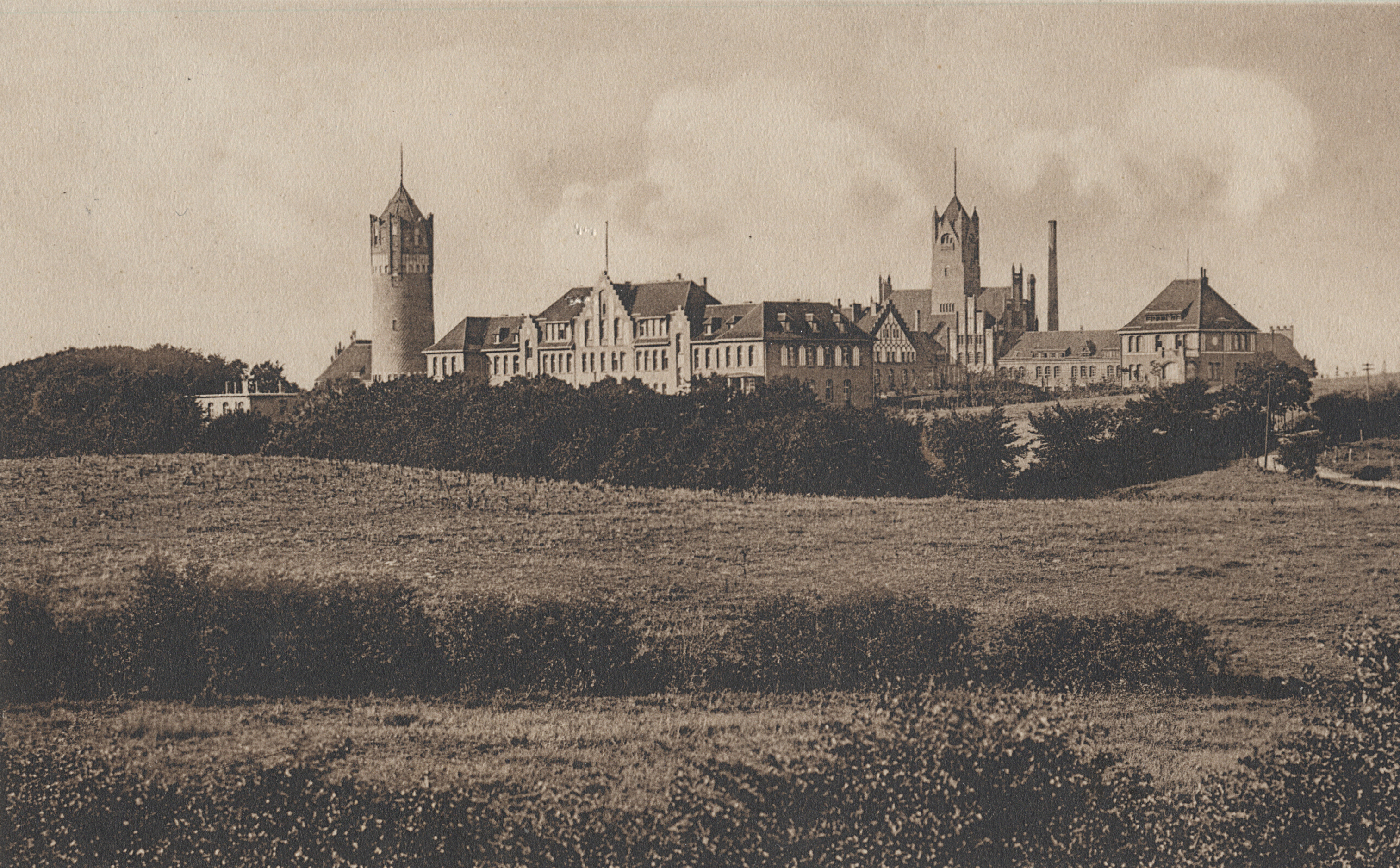 Mürwiker Burg um 1910, geerbt